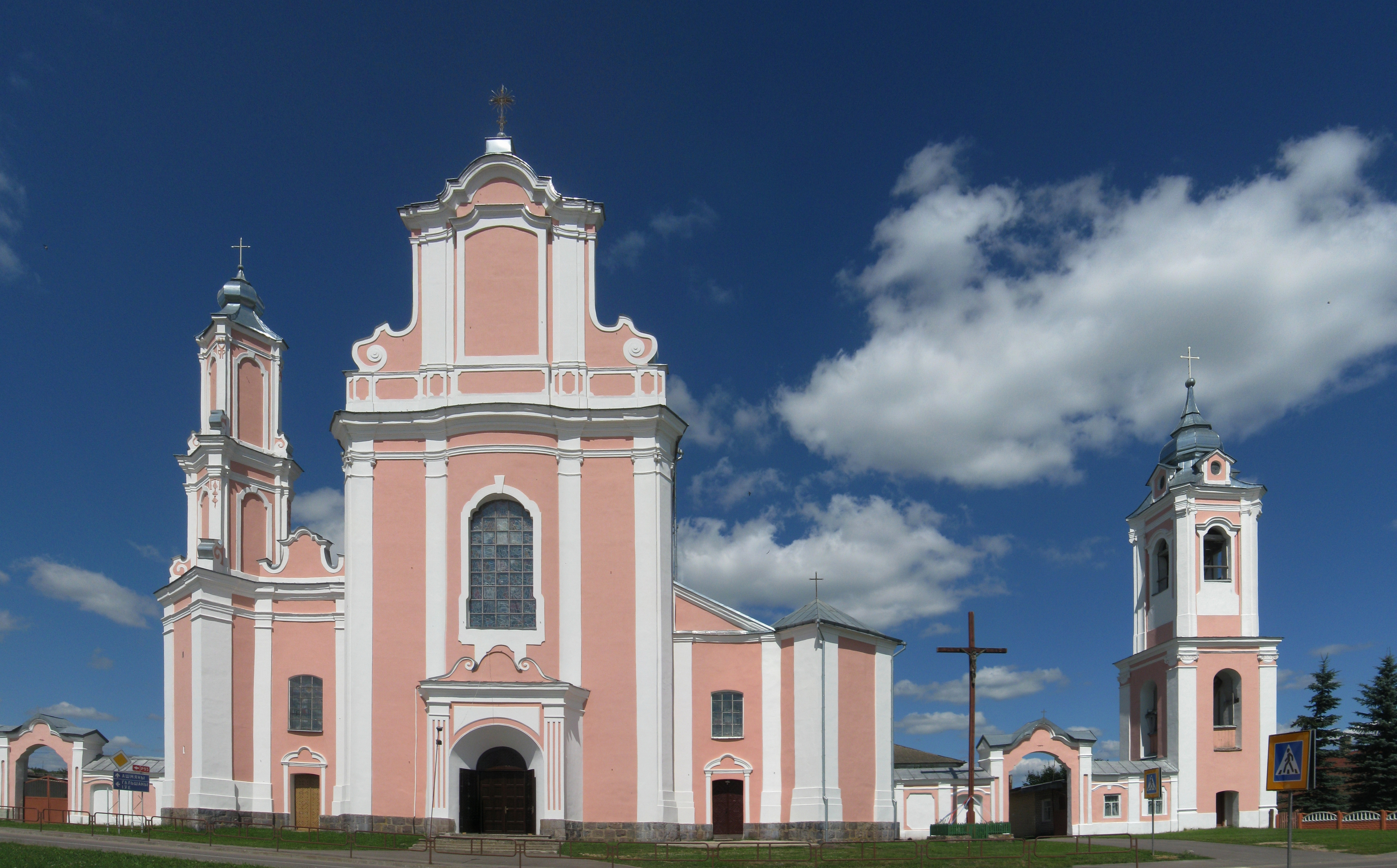 Беларуская (тарашкевіца): Ансамбль былога манастыра базылян: Петрапаўлаўская царква са званіцай, агароджай і брамамі дэкаратыўнае аздабленьне інтэр’ера царквы: тры алтары, амбон жылы корпус капліца. в. Баруны This is a photo of Belarusian heritage monument. Reference number: 412Г000062 ( WLM)